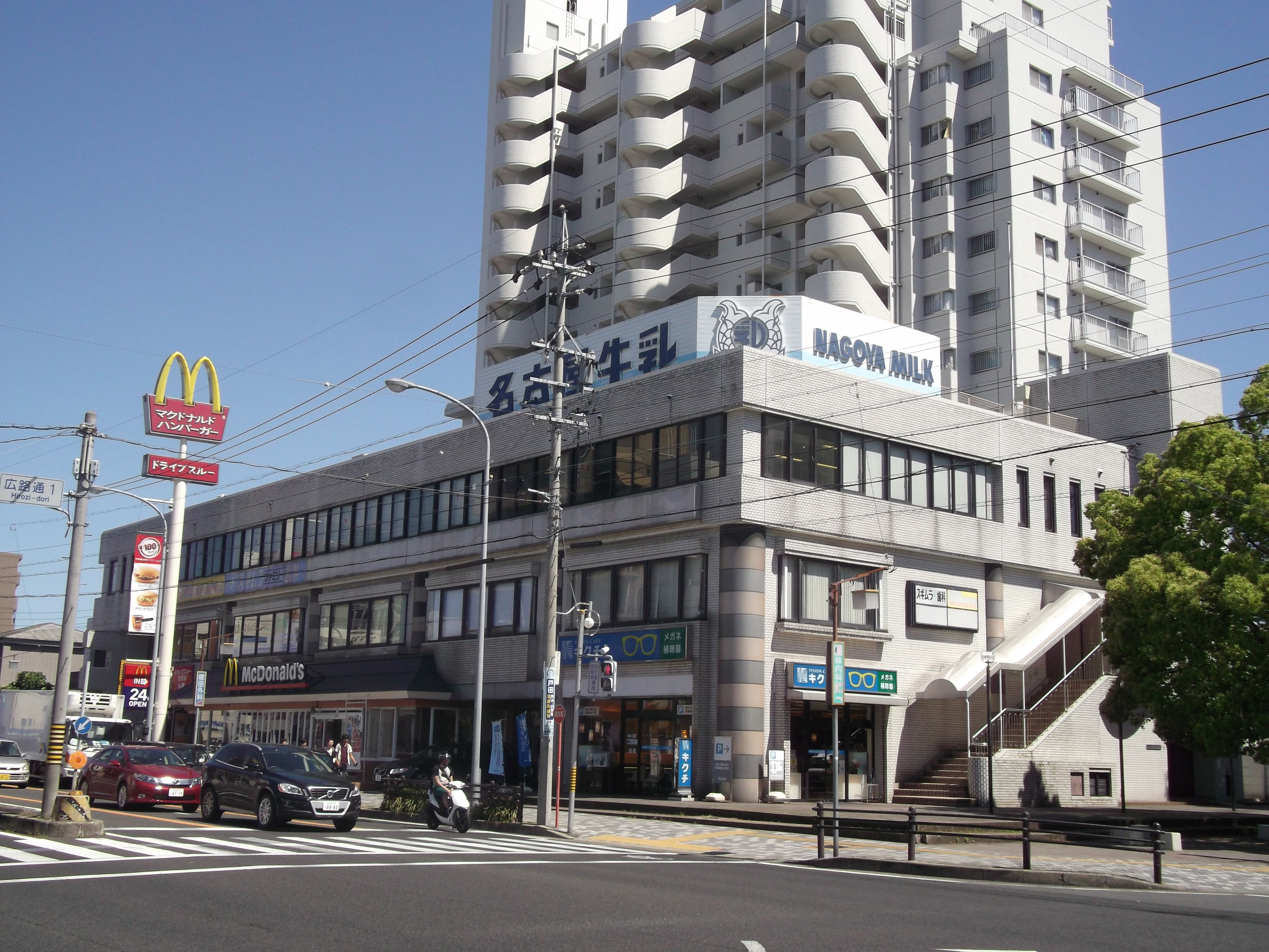 名古屋市昭和区の名古屋牛乳本社を北側公道西側から写す